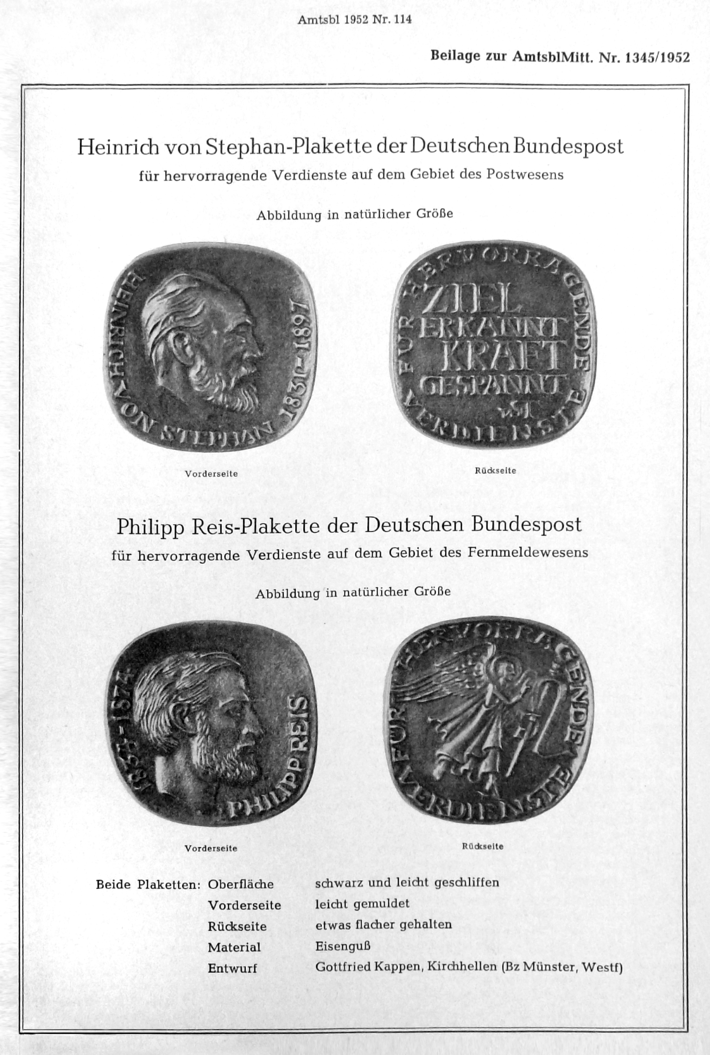 Amtsblatt des Bundesministers für das Post- und Fernmeldewesen, Jahrgang 1952, Ausgabe A, Frankfurt (Main), den 26. Oktober 1952, Nr. 98, S. 491. Beilage zur Amtsblatt. Nr. 1334/1952. Heinrich-von-Stephan-Plakette und Philipp-Reis-Plakette